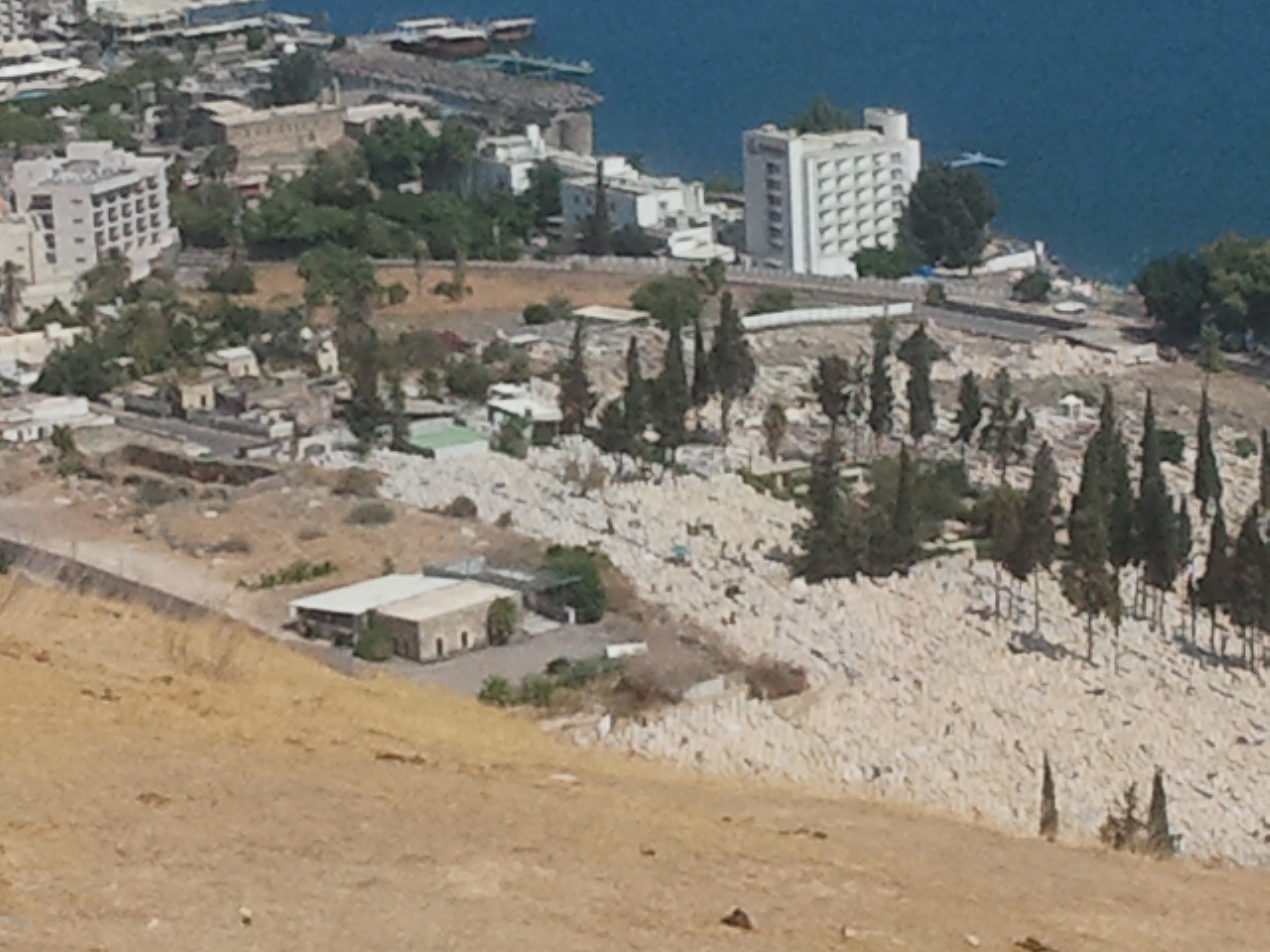 Tiberias